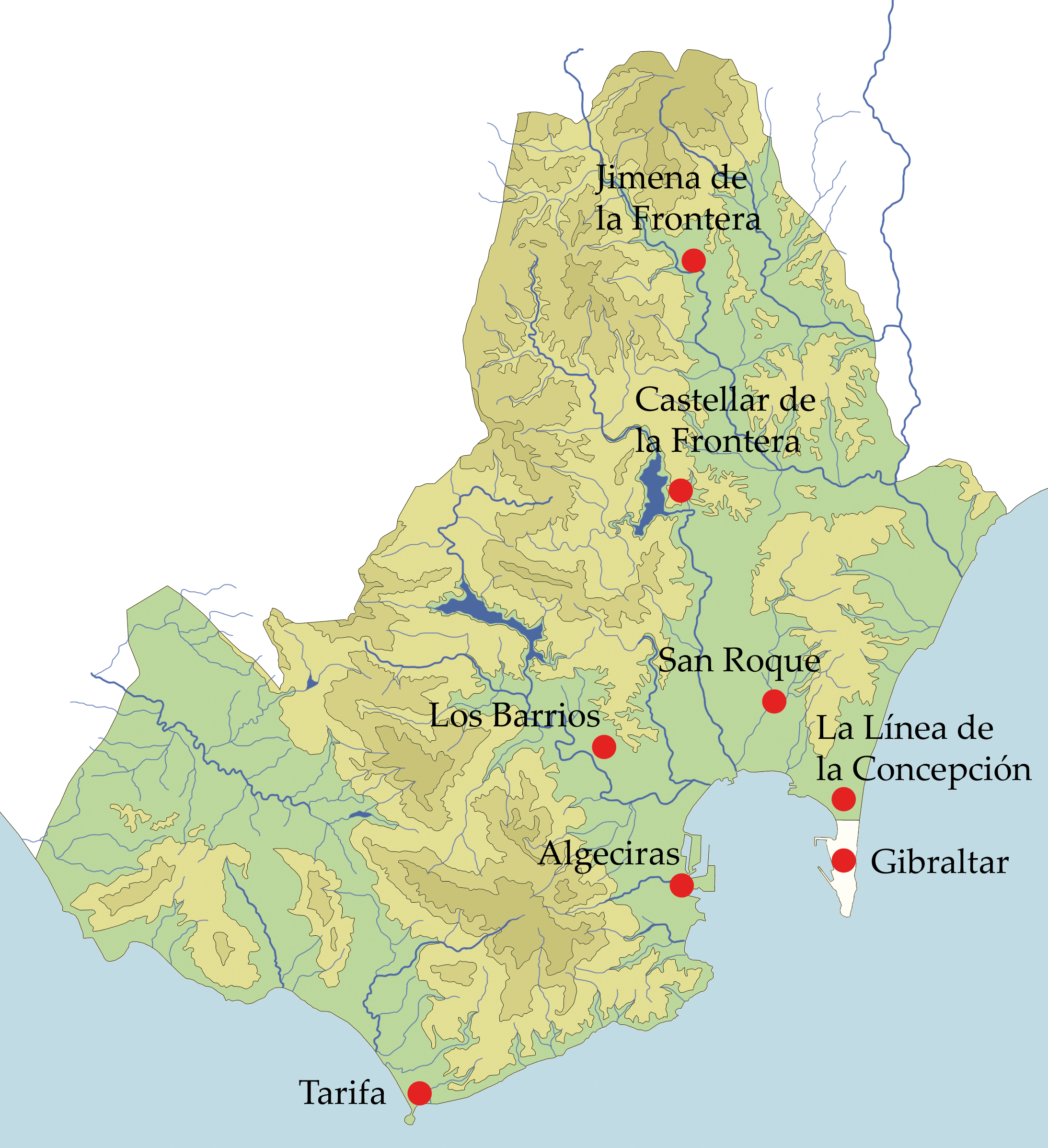 Plano de localidades del Campo de Gibraltar en el siglo XX.